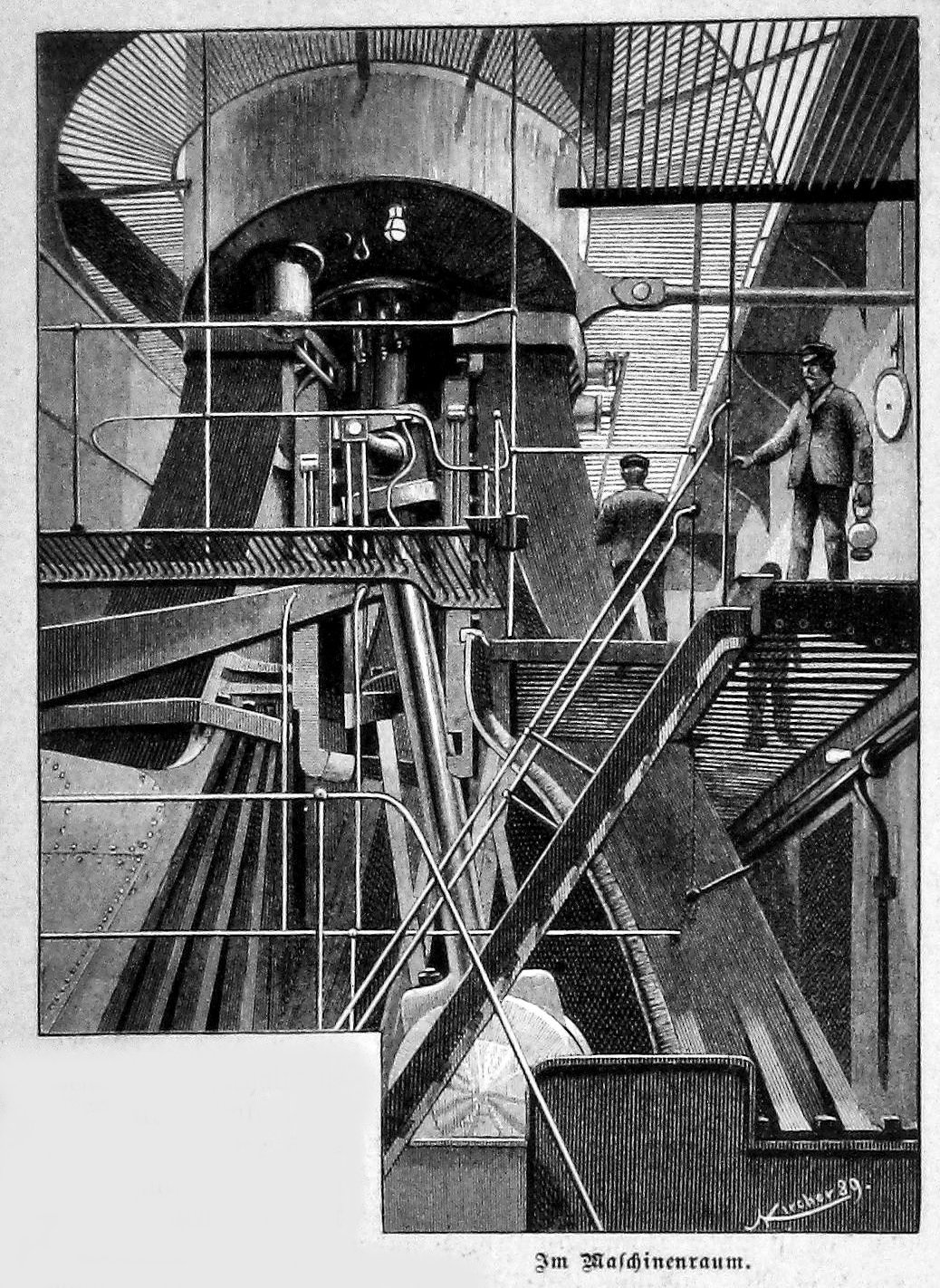 Maschine Schnelldampfer Columbia